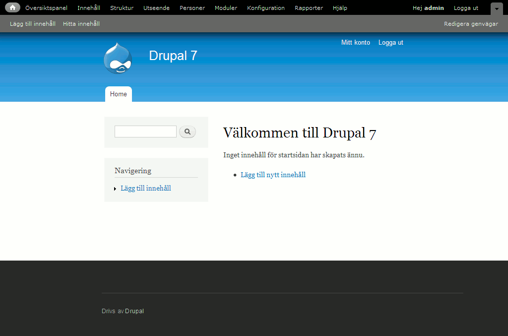 Startsidan för en standardinstallation av Drupal 7 med svenskt språkpaket.